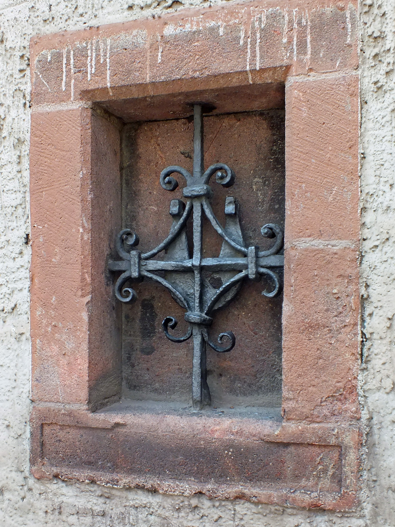 Historisches Hufeisen an der Nikolaikirche in Leipzig